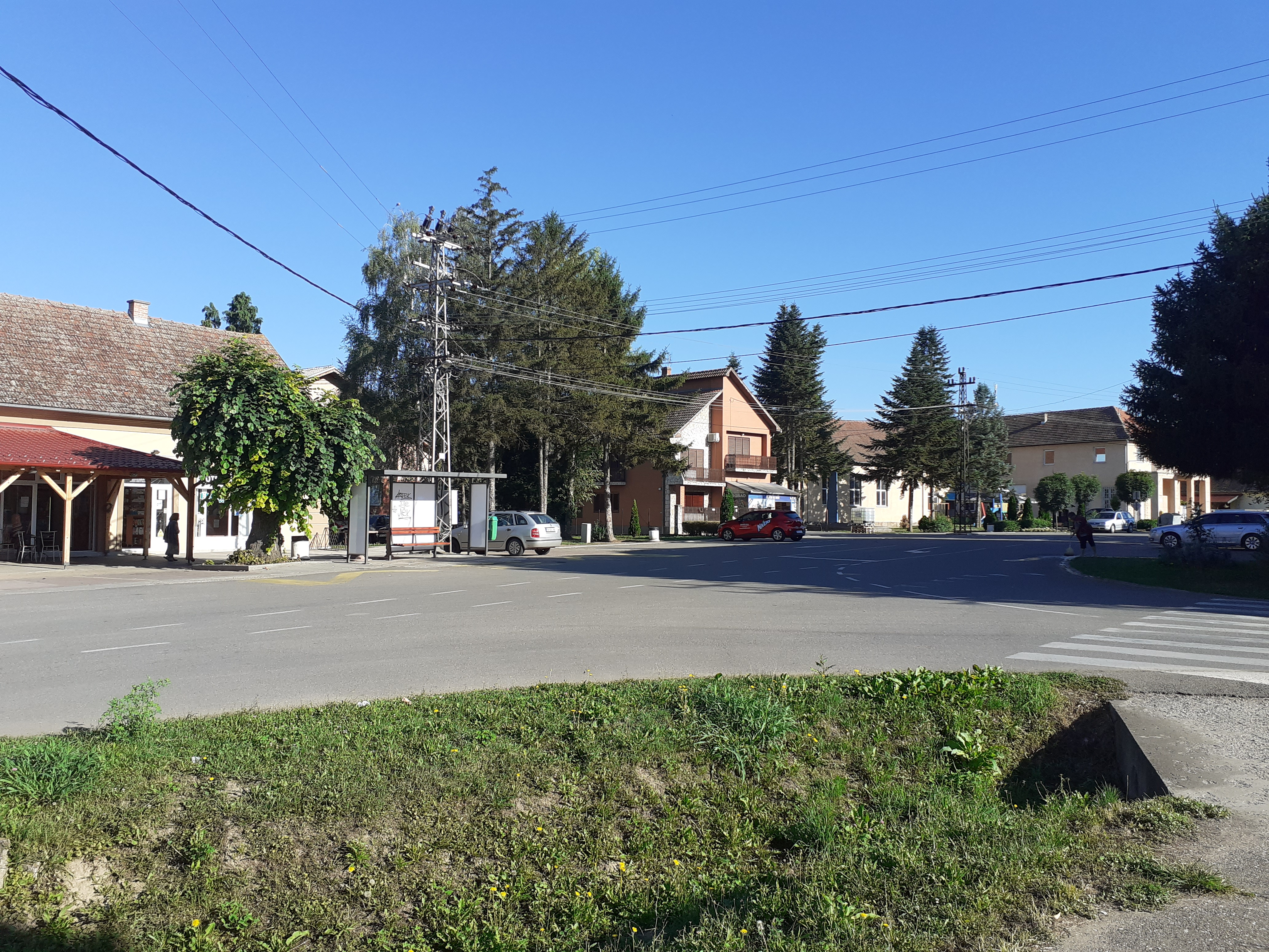 Центар Кленка, општина Рума, Србија